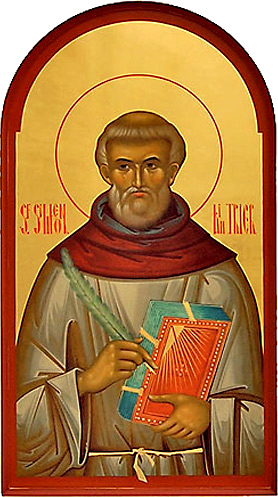 Simeons Ikone in Triers Dom. Photo.